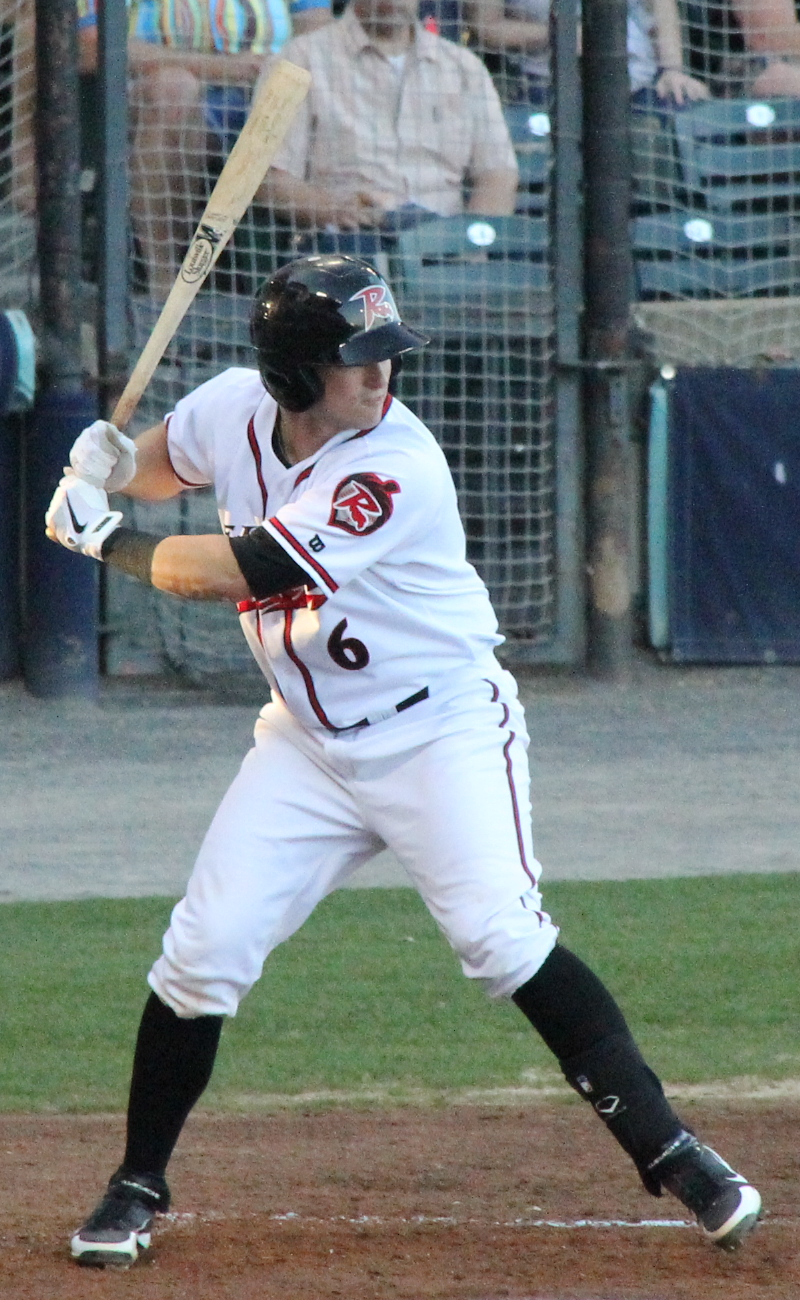 Andrew Susac